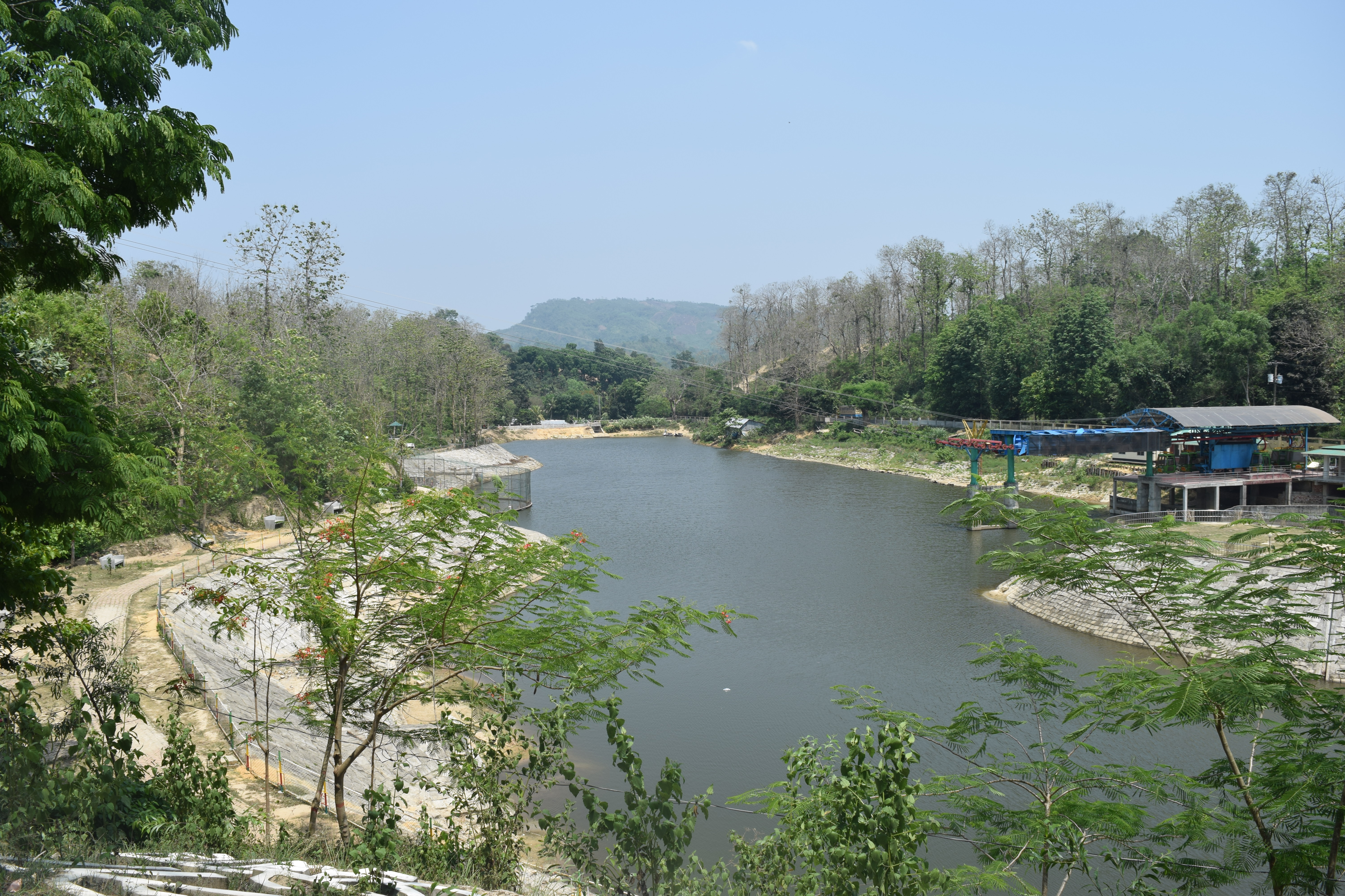 শেখ রাসেল পক্ষিশালা এবং ইকোপার্ক